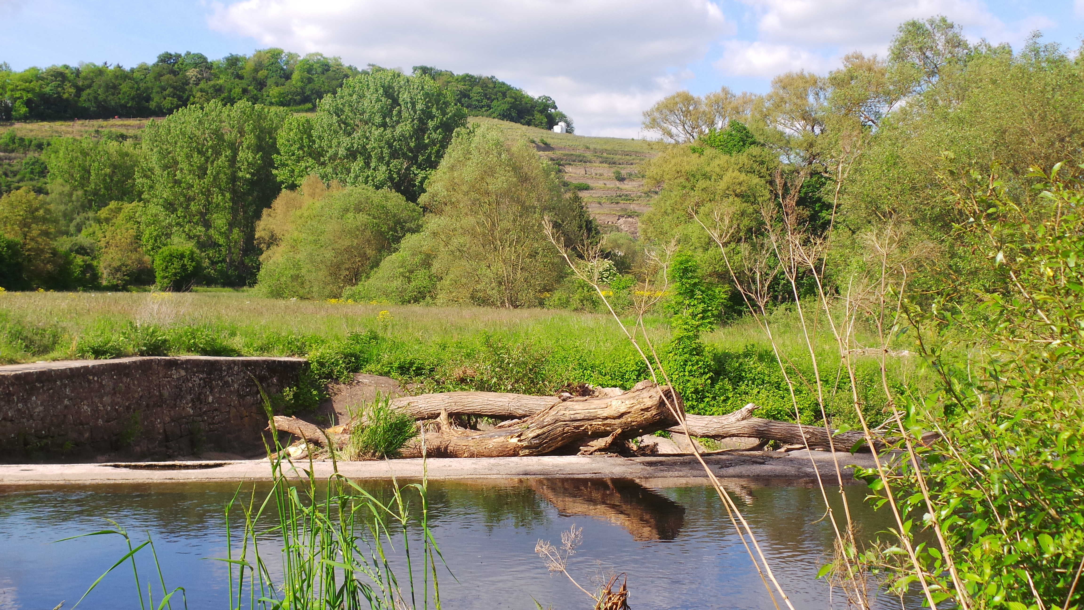 Naturpark Soonwald-Nahe: Blick von der Glan (Vordergrund) zum Disibodenberg (Wald auf der Kuppe im Naturschutzgebiet „Disibodenberg“).